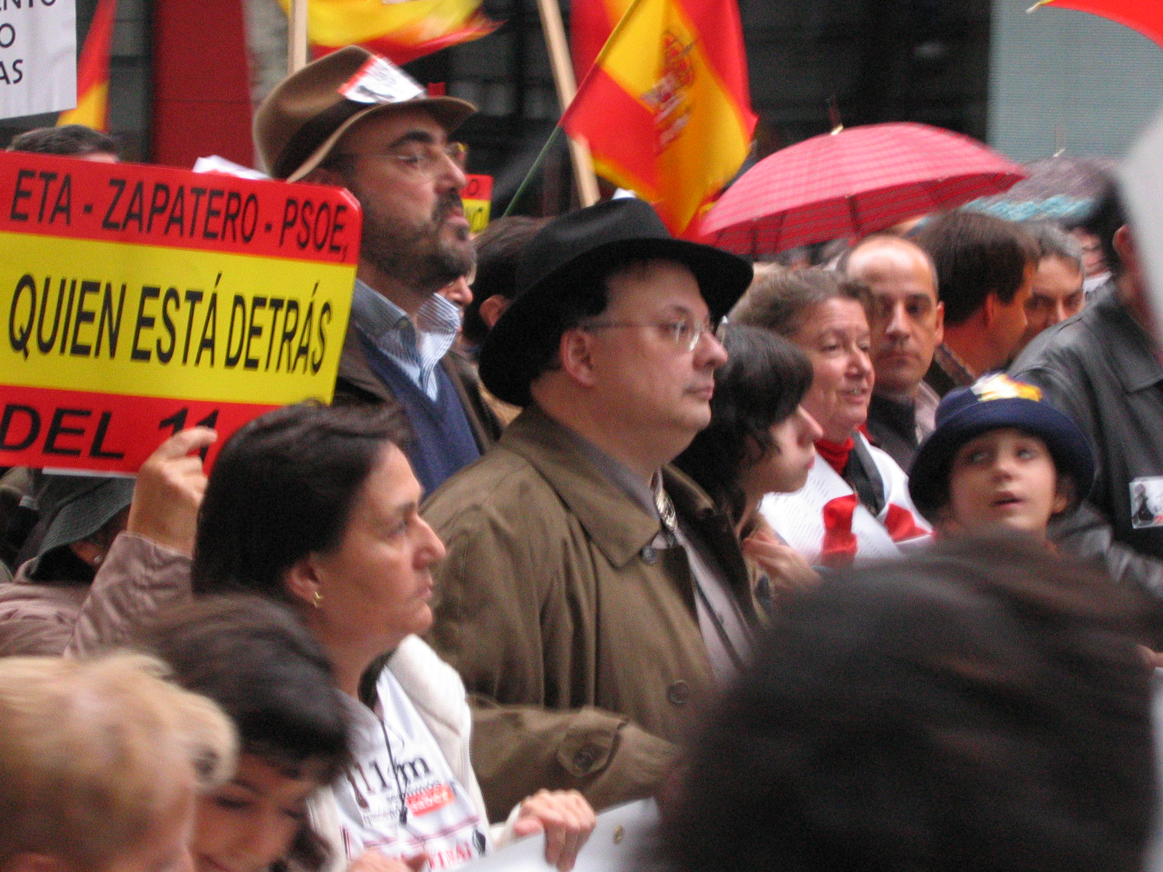 César Vidal en la manifestación convocada por la AVT en Madrid, el 25 de noviembre de 2006 con el lema "Rendición en mi nombre, ¡NO! Derrotemos al terrorismo".